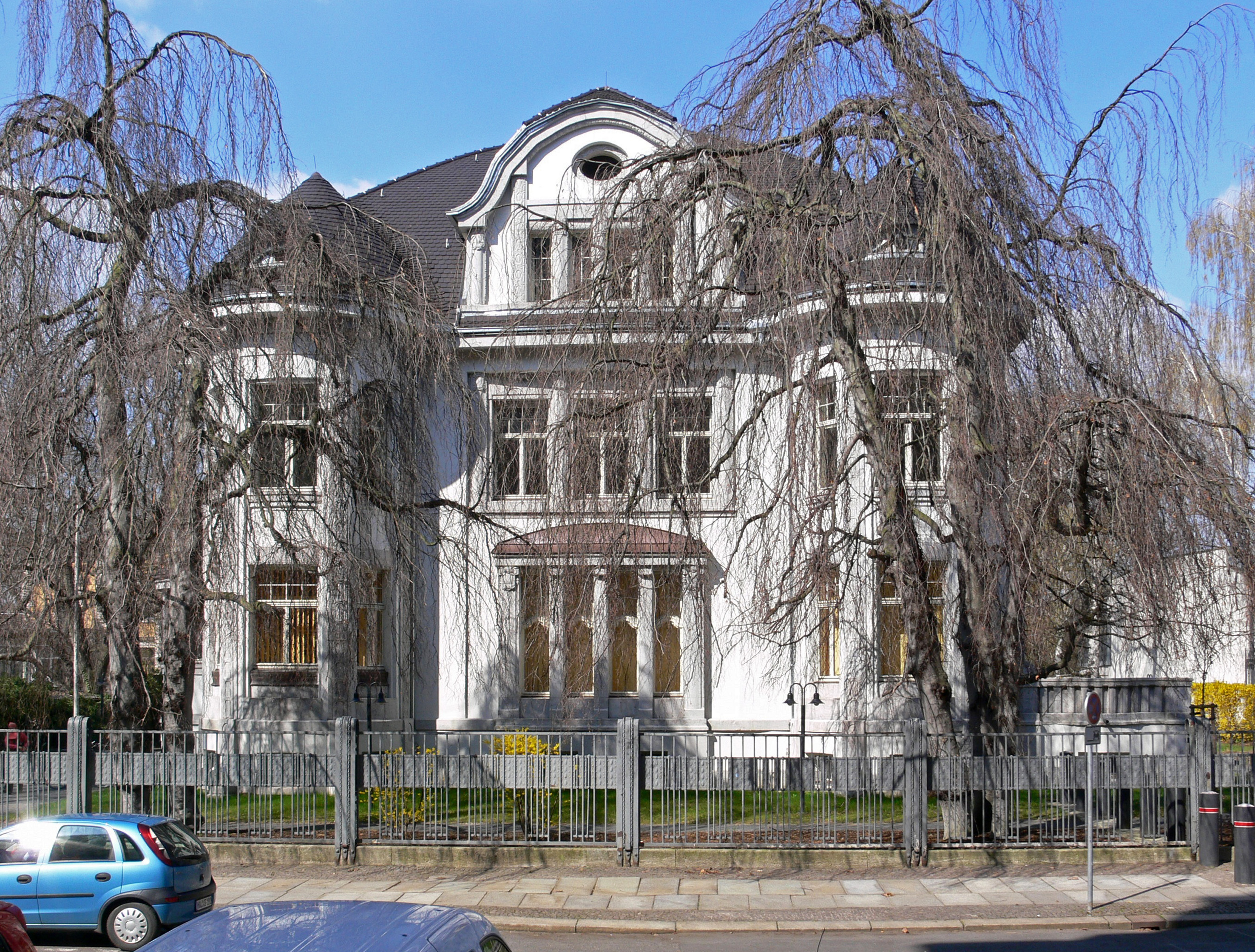 Leipzig, Literaturinstitut Leipzig, Wächterstr. 34